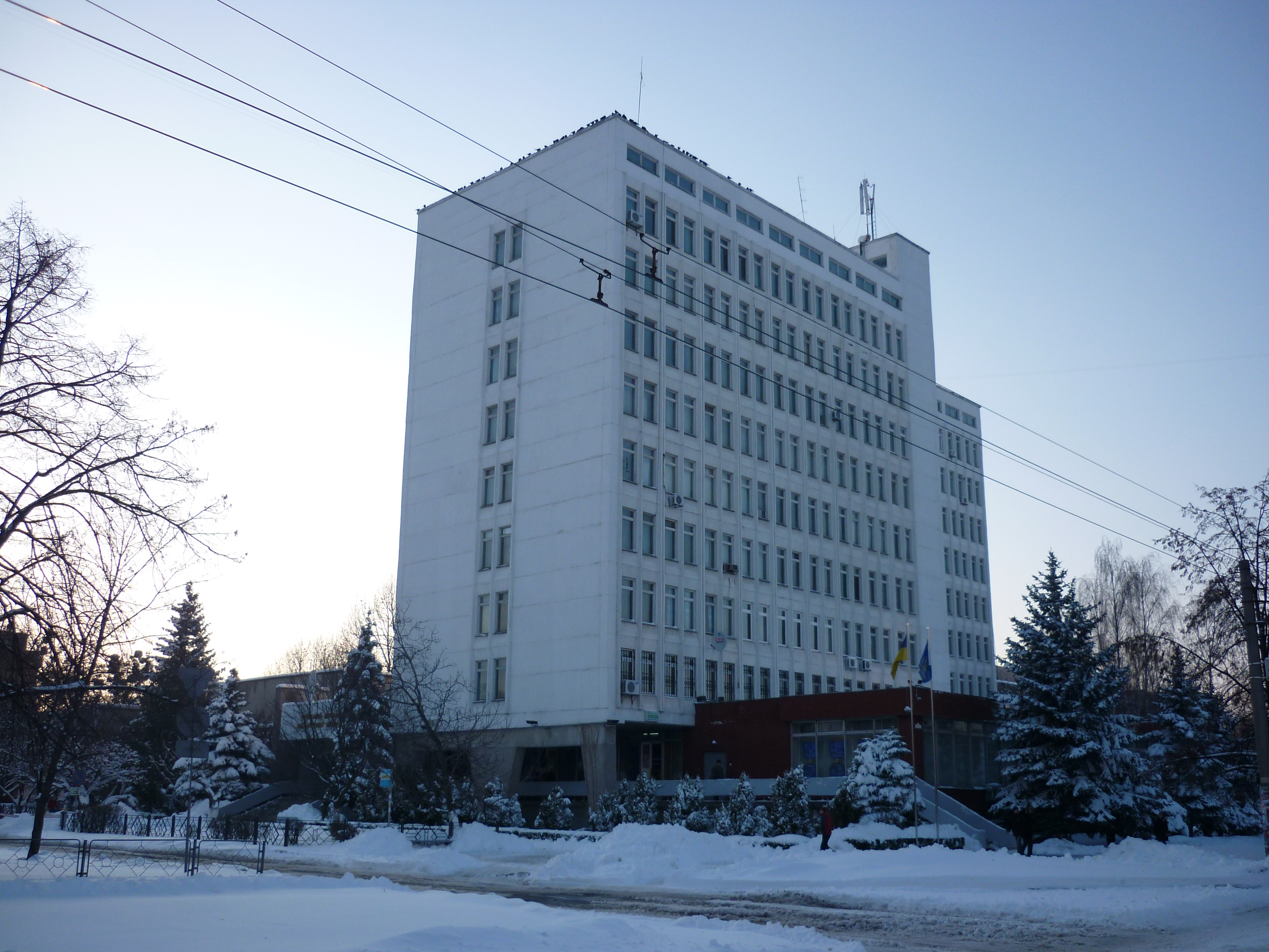 ЧДТУ1: Головня будівля ЧДТУ